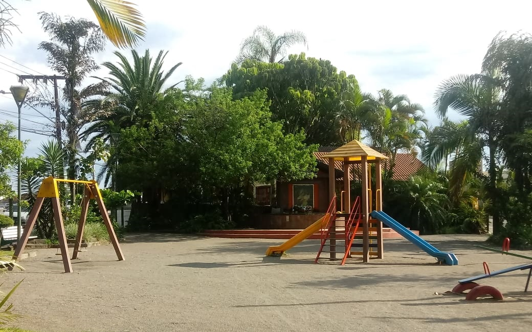 Praça Mãe Peregrina, localizado no bairro Iririú